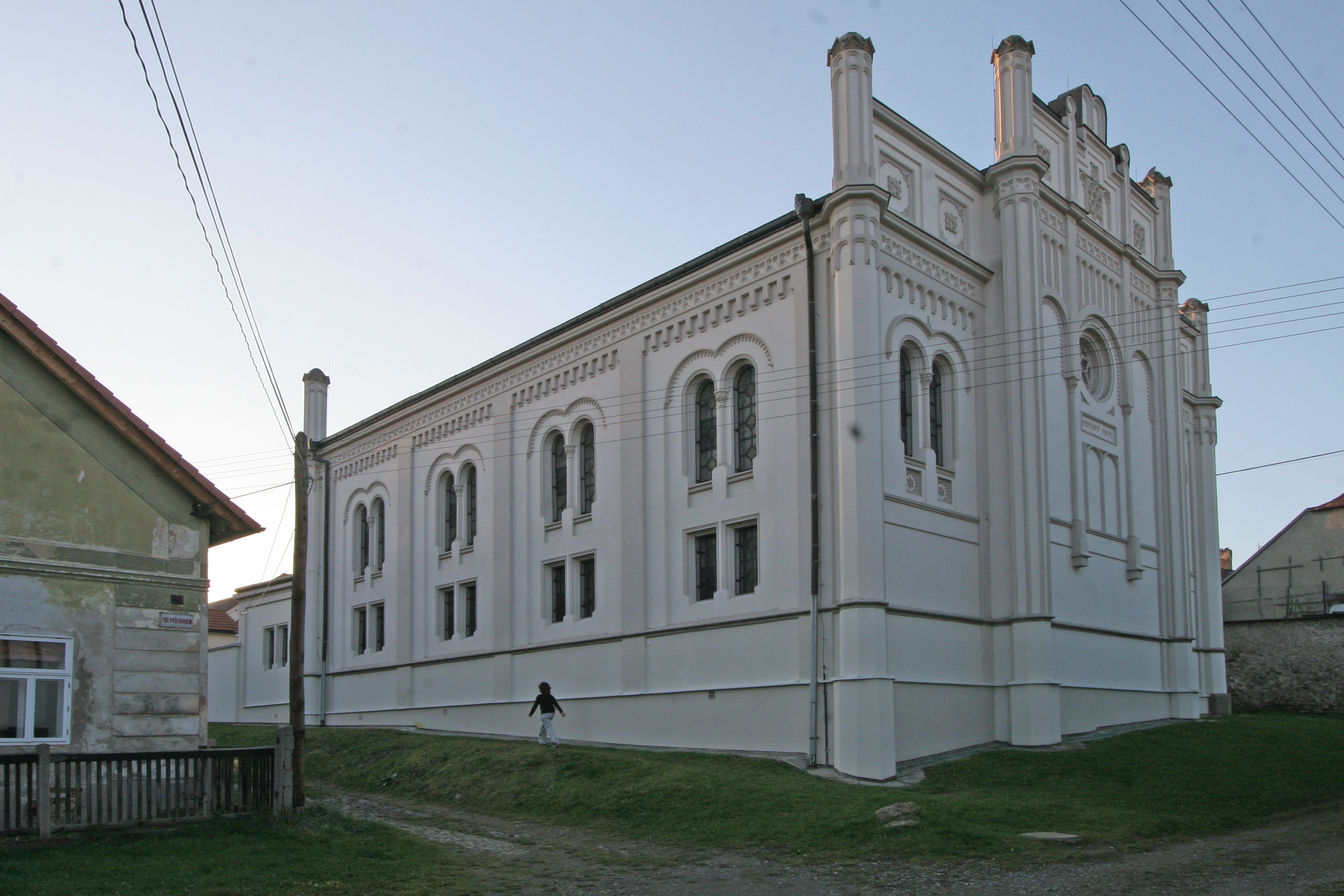 Židovský dům - židovská čtvrť, synagoga a soubor domů (Golčův Jeníkov), ghetto, Golčův Jeníkov